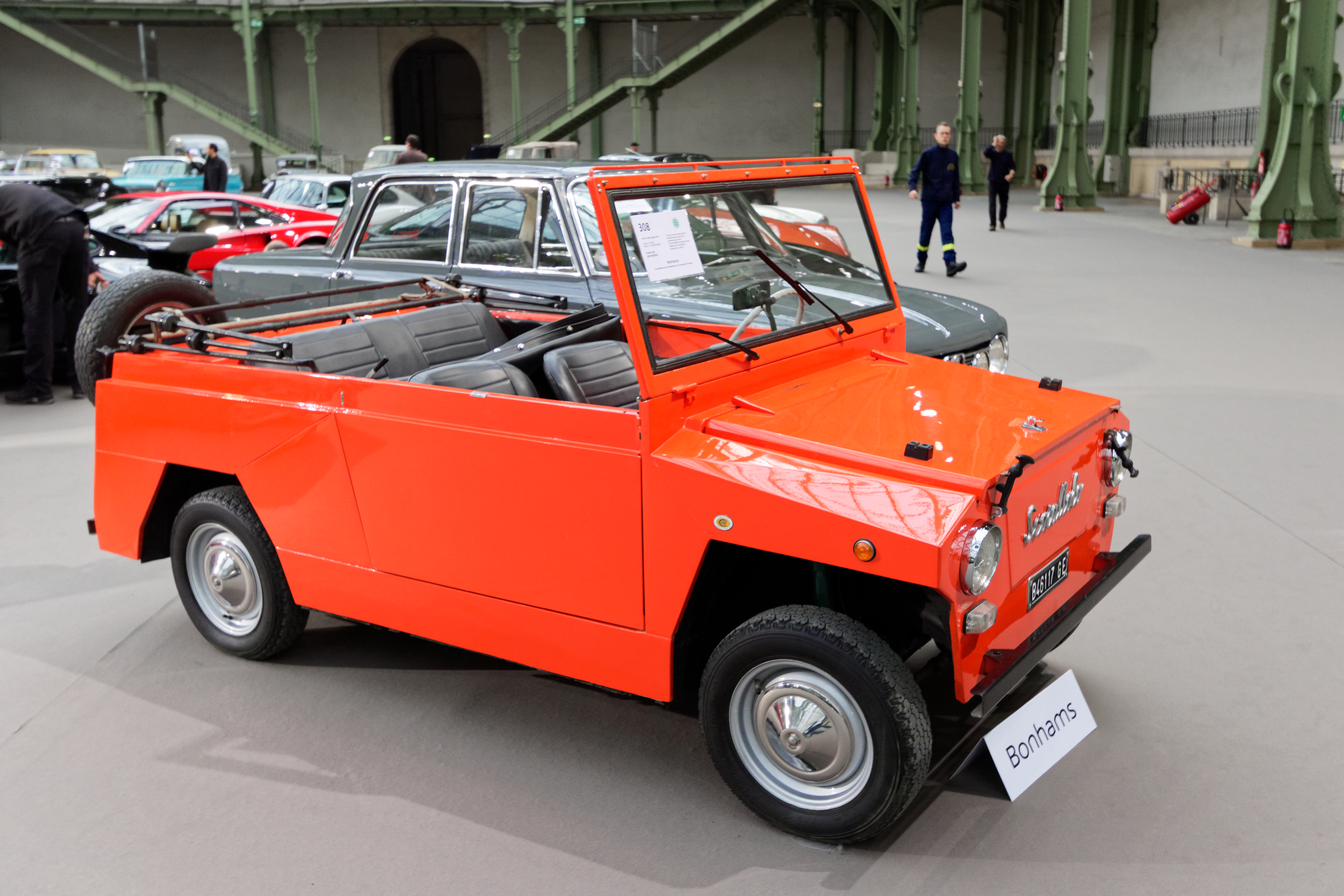 Un des véhicules présenté lors de la vente aux enchères Bonhams 2017 au Grand Palais de Paris.